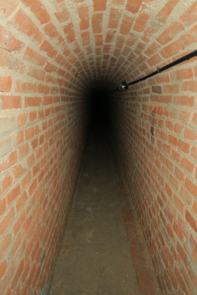 El Área de Gobierno de Medio Ambiente y Movilidad ha comenzado la restauración de varios tramos del Viaje de Agua de Fuente del Berro, en el distrito de Salamanca, con el fin de recuperar y mantener el patrimonio cultural de Madrid así como el aprovechamiento sostenible de los recursos hídricos del subsuelo procedentes de esta instalación arqueológica del siglo XVI. La obra tiene un coste de 320.778,85 euros, impuestos incluidos, a cargo de las Inversiones Financieramente Sostenibles y finalizará a mediados de octubre.